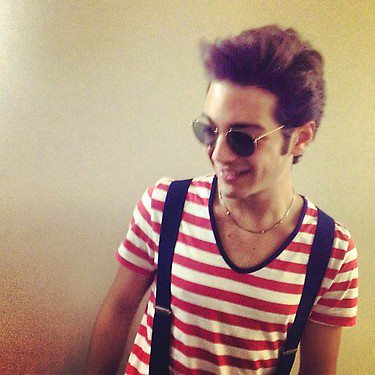 Nació el 11 de febrero de 1995 en Abruzzo, Italia, es barítono, tiene un hermano menor de 12 años, su artista favorito es Andrea Bocelli, su comida favorita es la comida italiana, su color favorito es el azul oscuro, su deporte favorito es el futbol, “Si no fuera cantante me gustaría ser un futbolista profesional” dijo el en una entrevista, le va al Barcelona. - Gianluca Ginoble irrumpió en la escena musical al participar en el programa busca talentos de la televisión italiana "Ti lascio una canzone", en el año 2009 a los 14 años. Su notable registro vocal evoca rápidamente a Bocelli y a ratos no sabes quien canta. Mítico resulta ya el trío que conformó con Piero Barone e Ignazio Boschetto, cantando "O sole mio" en una humorada que parodiaba a los tres tenores. Los tres ya tienen prometedoras carreras en Italia y en muchos otros países del mundo Definitivamente Italia es un país de cantantes y todos los concursos de talentos emergentes del mundo pasan a segunda categoría por la calidad de estos niños y preadolescentes italianos.